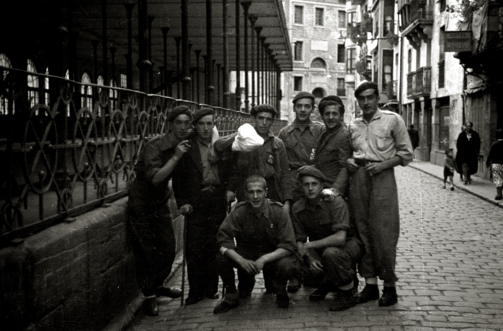 Título original: Desfile de la 5ª Bandera en Tolosa (12/19) Localización: Tolosa (Guipúzcoa)